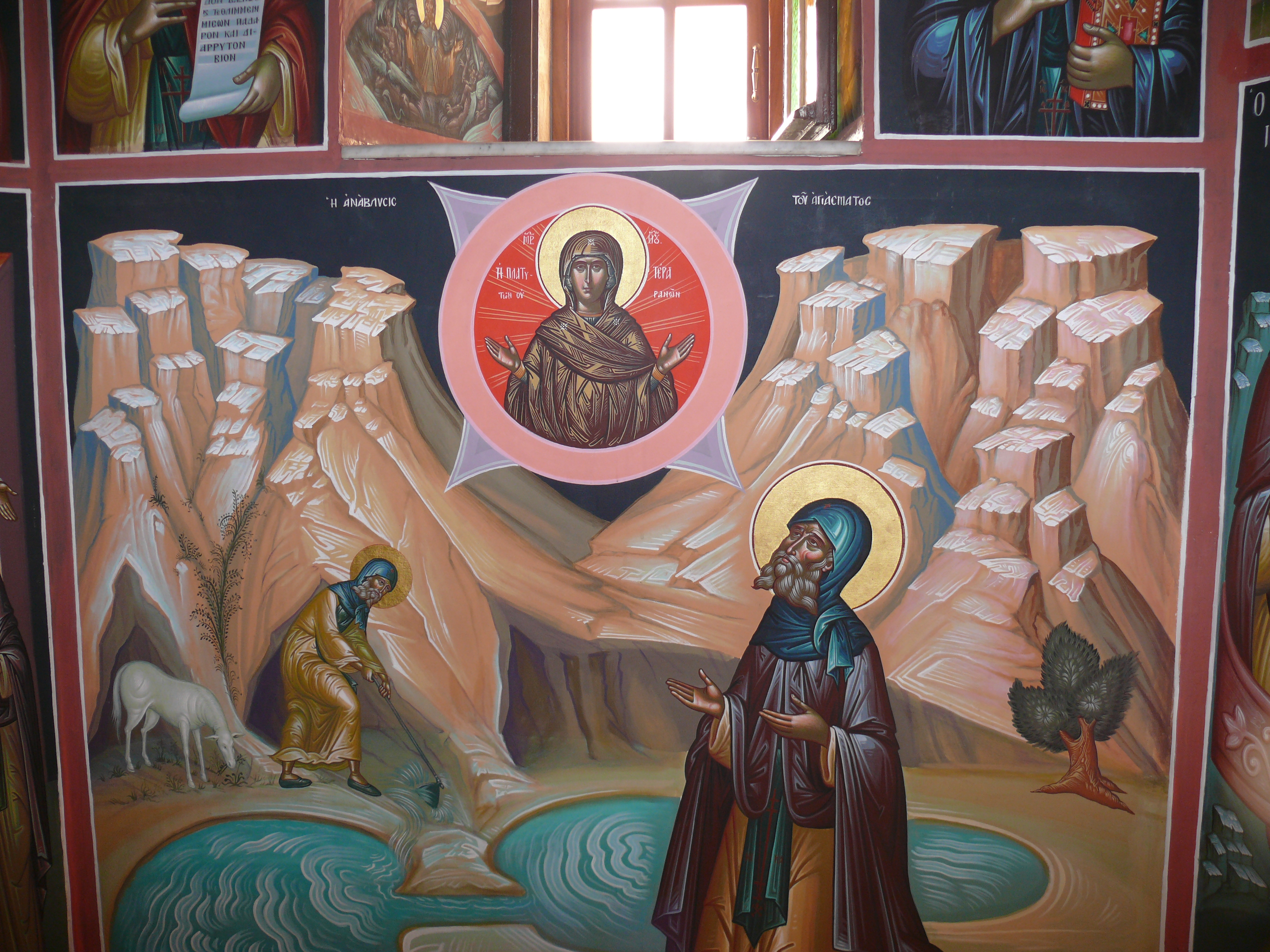 Mar Saba